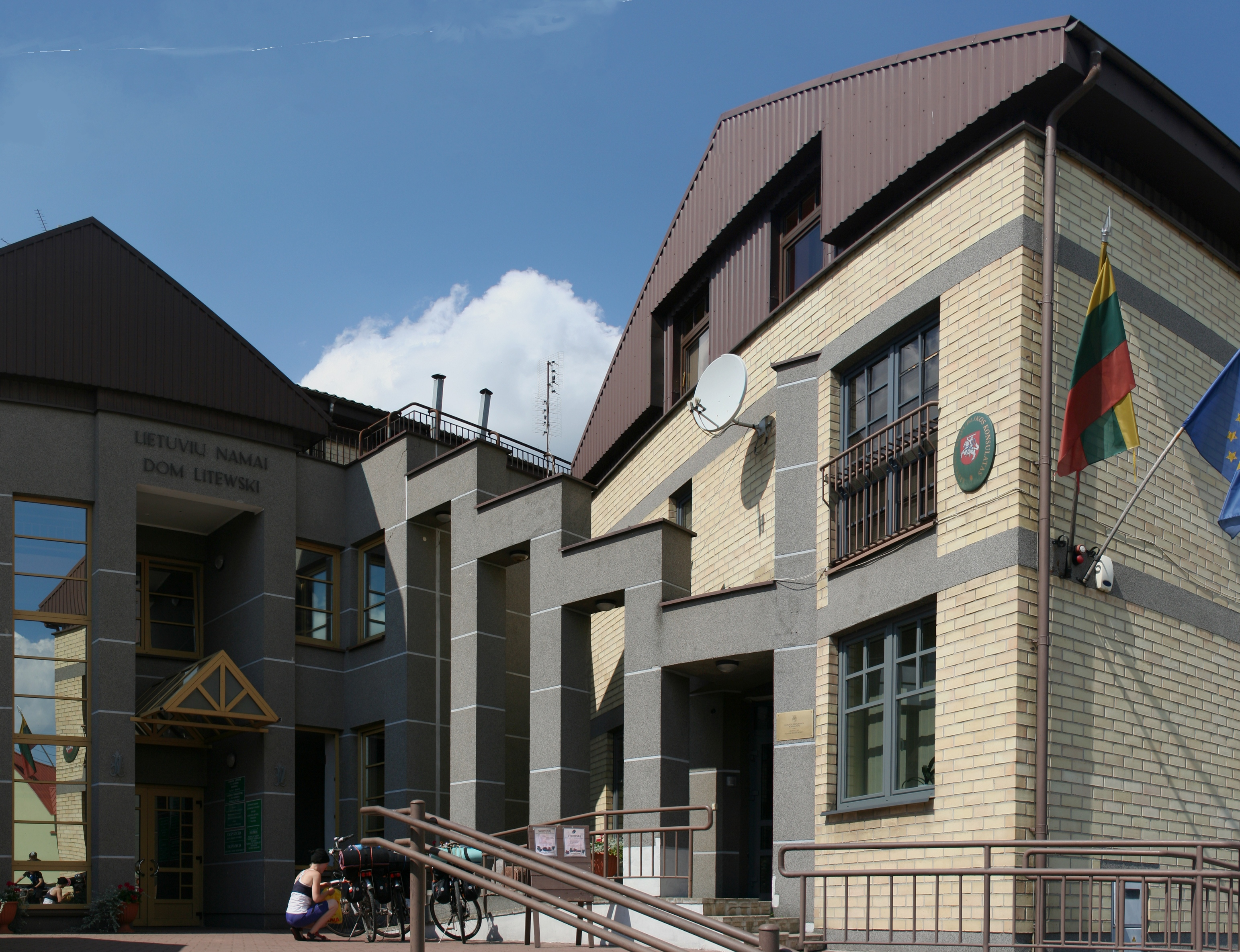 Dom Litewski w Sejnach, woj. podlaskie - dawna karczma